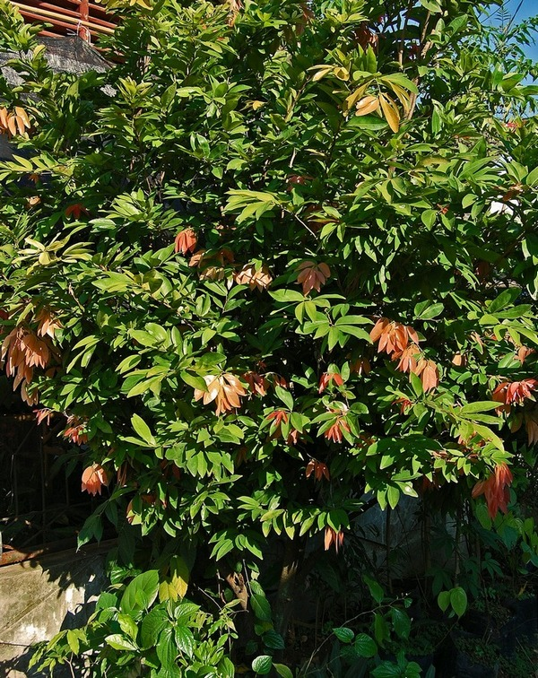 Cynometra cauliflora habits. Bogor, West Java, Indonesia